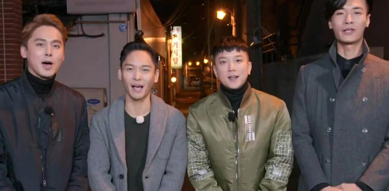 오빠들이 돌아왔다! 13년만의 완전체 컴백 클릭비 (식신로드 GOURMET ROAD) 261회 예고